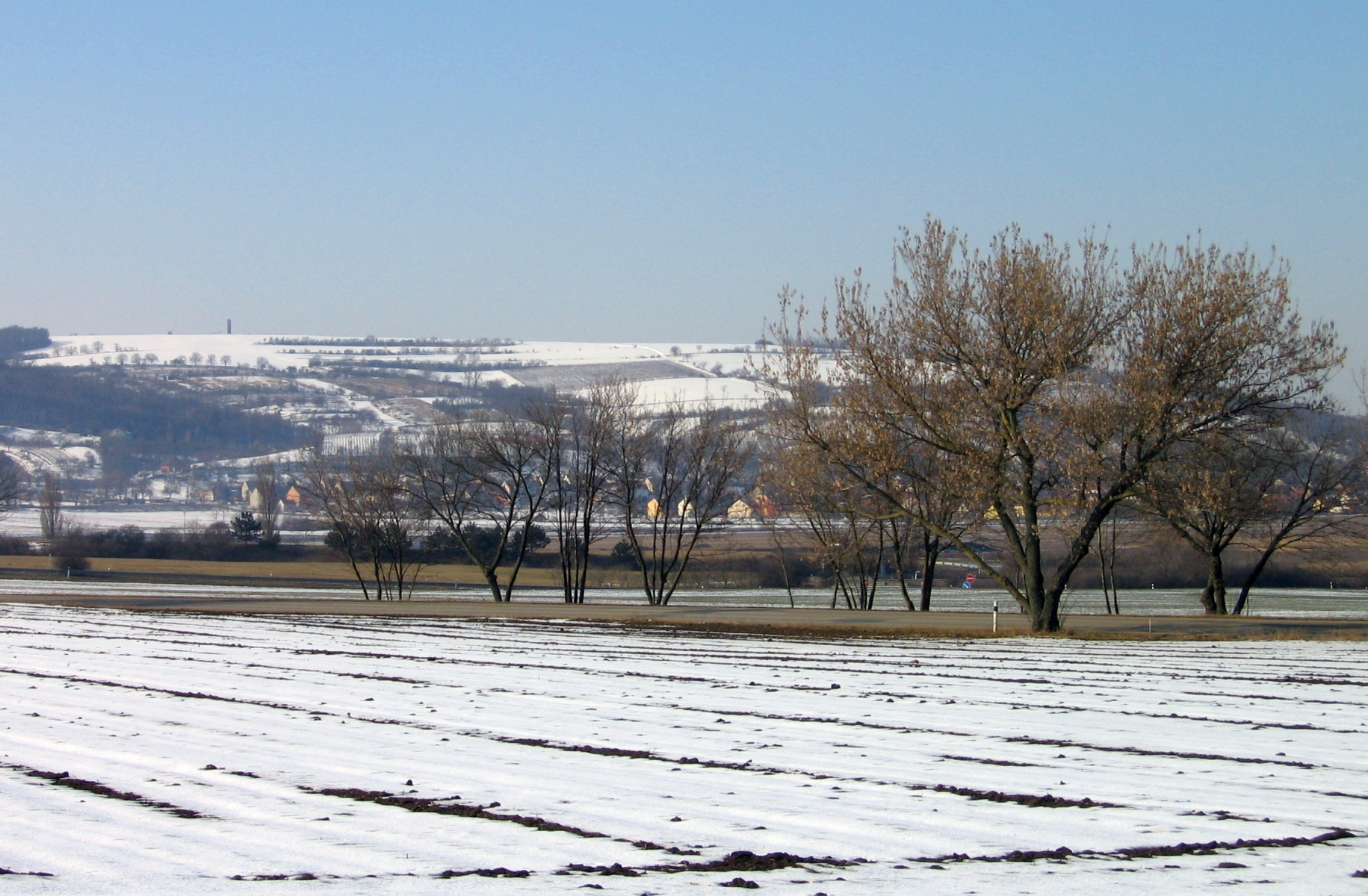 Výhon od severovýchodu. Na úpatí masivu obec Blučina, na hřebeni vlevo rozhledna Akátová věž.